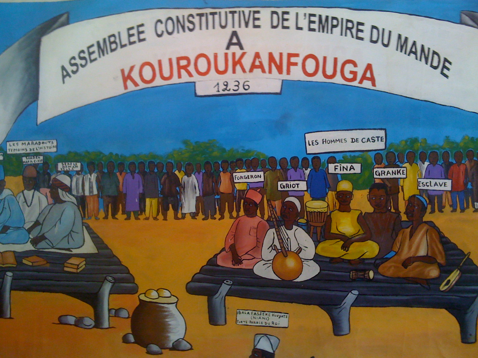 les marabouts